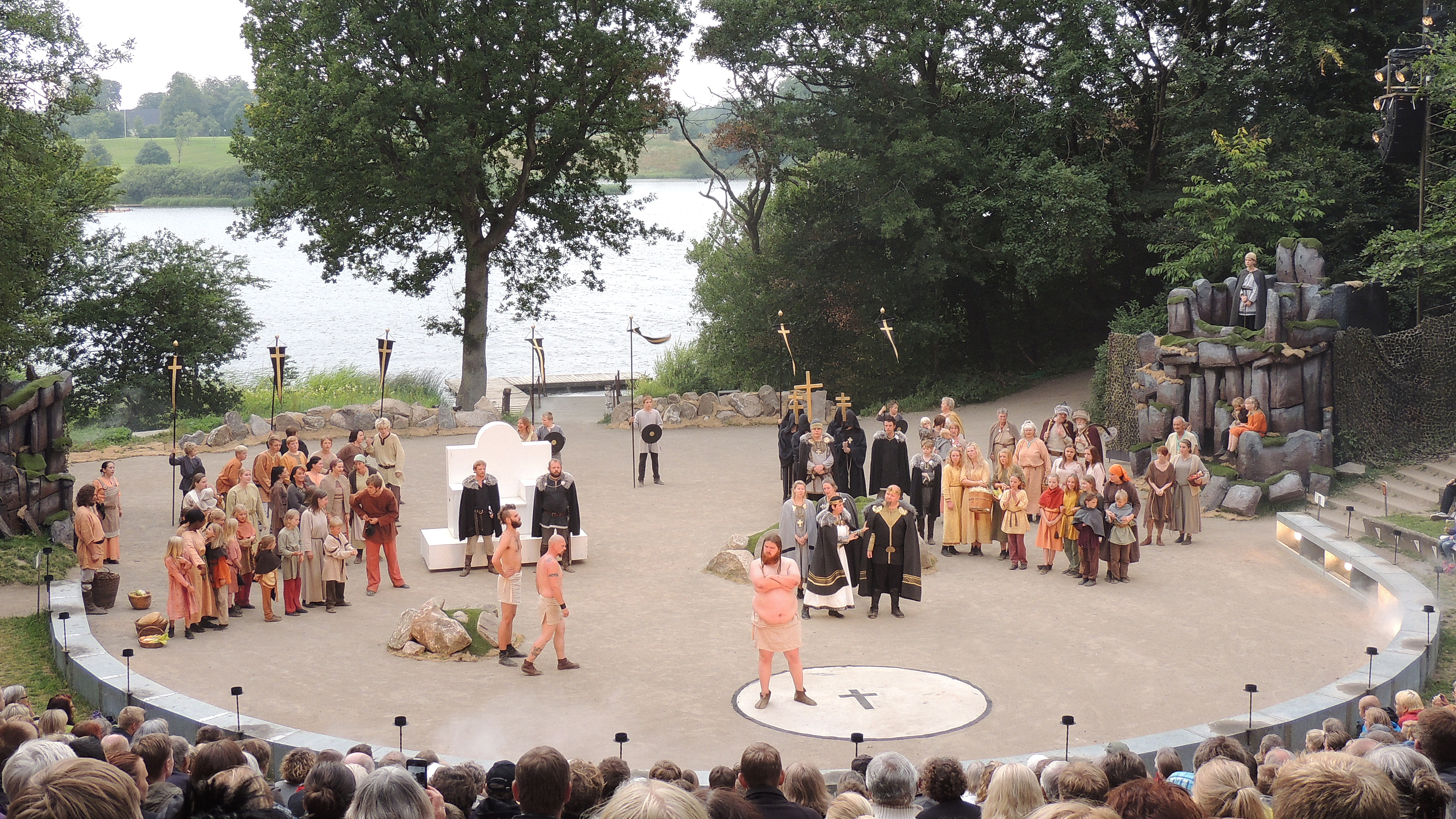 Vikingespil i Jels